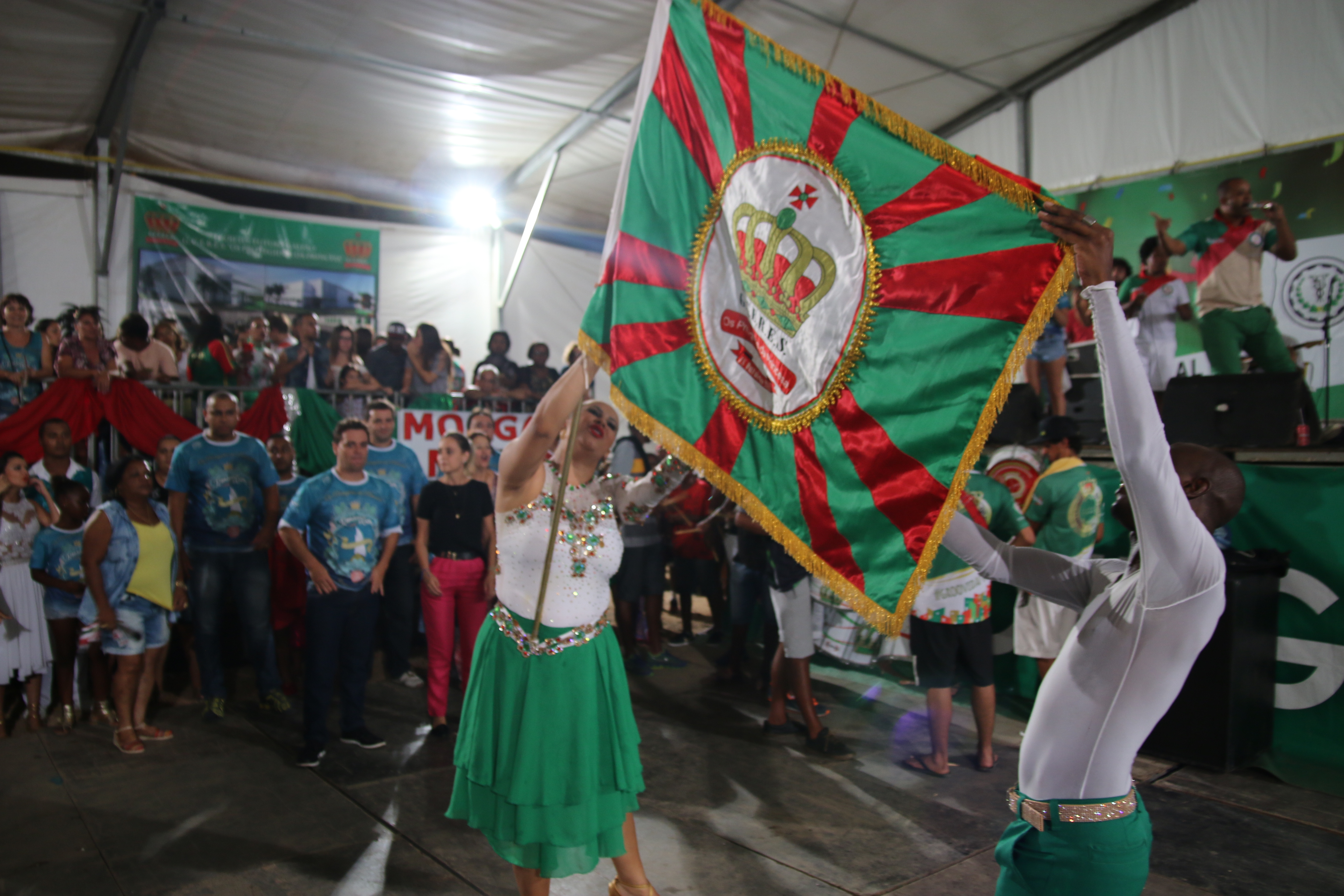 Mestre-sala e porta-bandeira exibem o pavilhão da G.C.E.R.E.S. Os Protegidos da Princesa durante um ensaio em 2015.